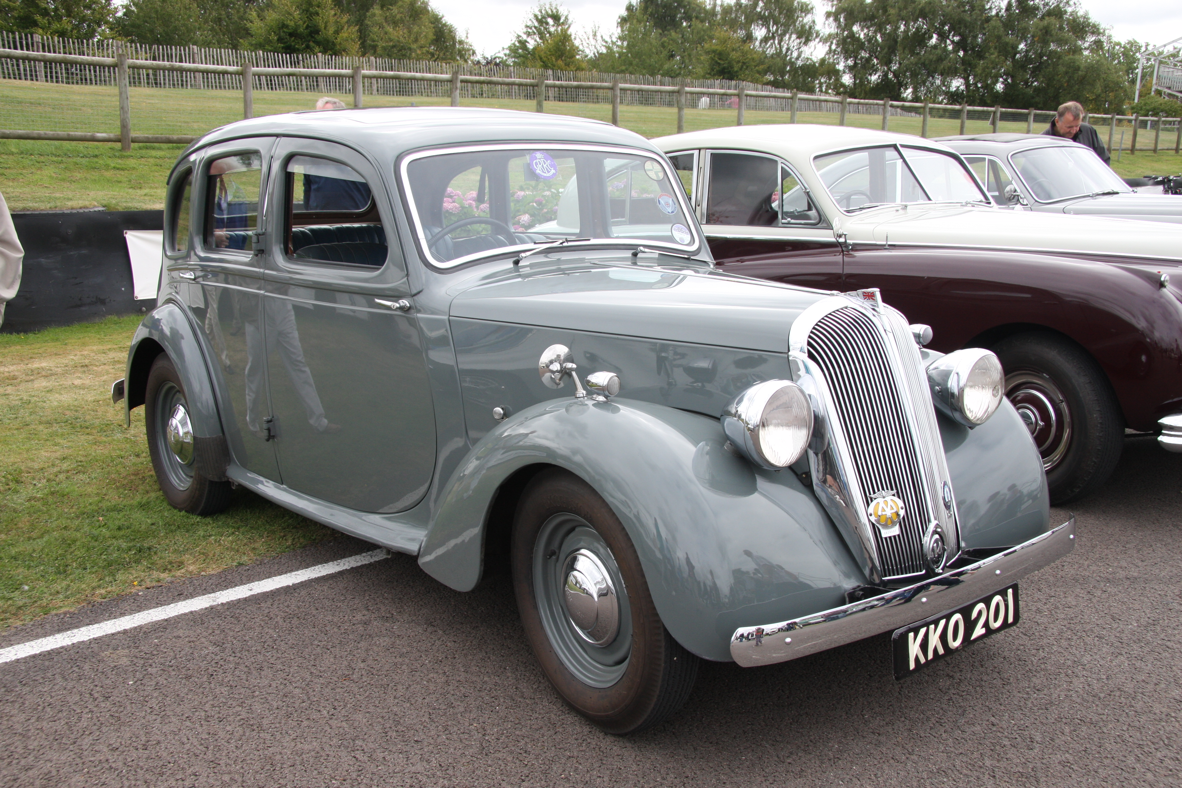 1948 Standard 14 CD